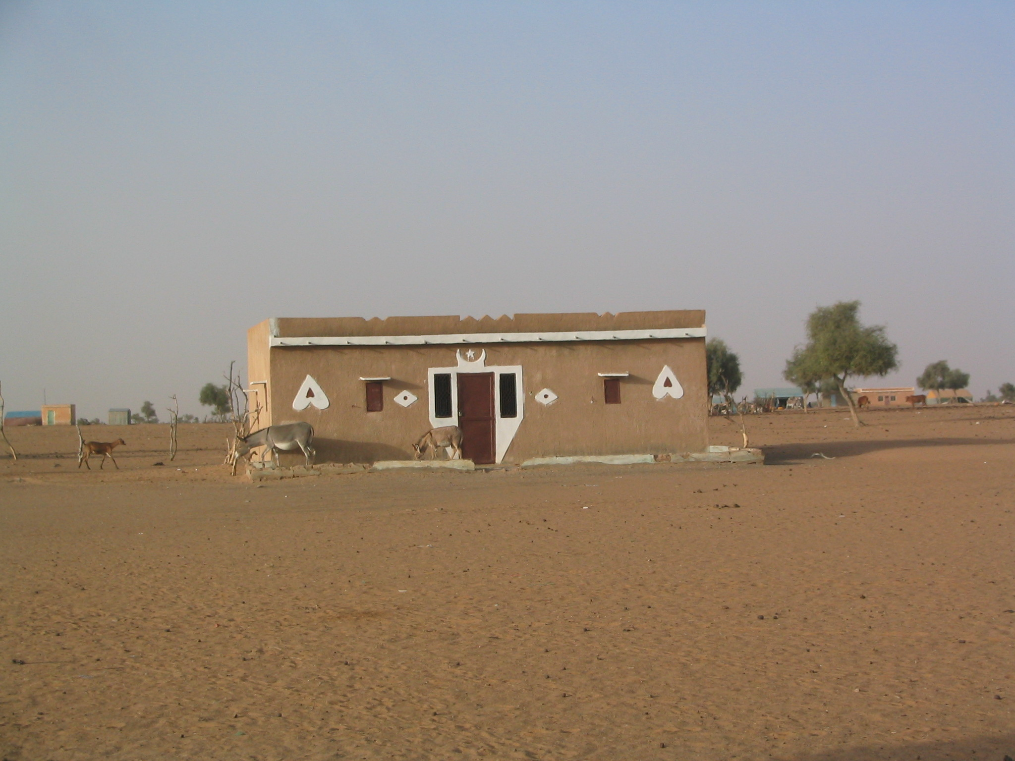 Maison typique dans le Trarza (sud de la Mauritanie), dans les environs de Rkiz